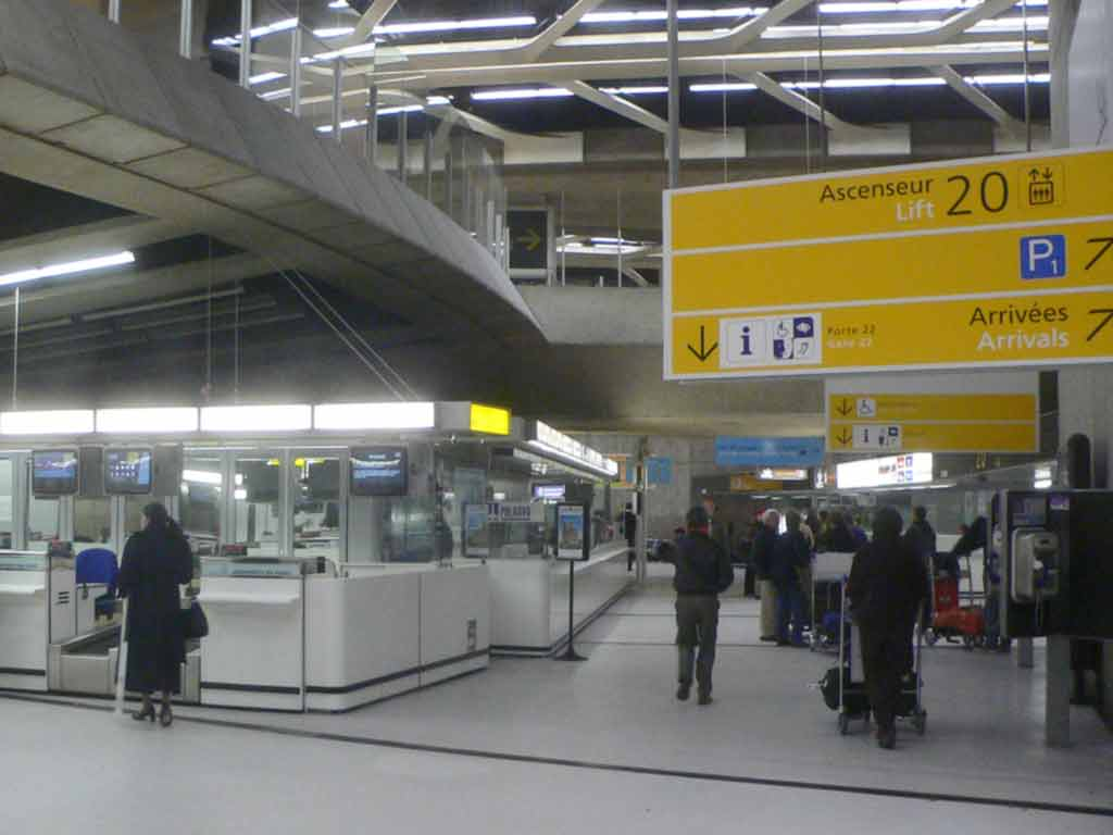 Terminal 1 del aeropuerto Paris Charles de Gaulle International Airport Terminal 1 Departures Level Check-In Hall 20 before Rebuilding Jan 2006